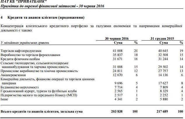 Концентрація клієнтського кредитного портфелю за галузями економіки та напрямками комерційної діяльності 30.06.2016